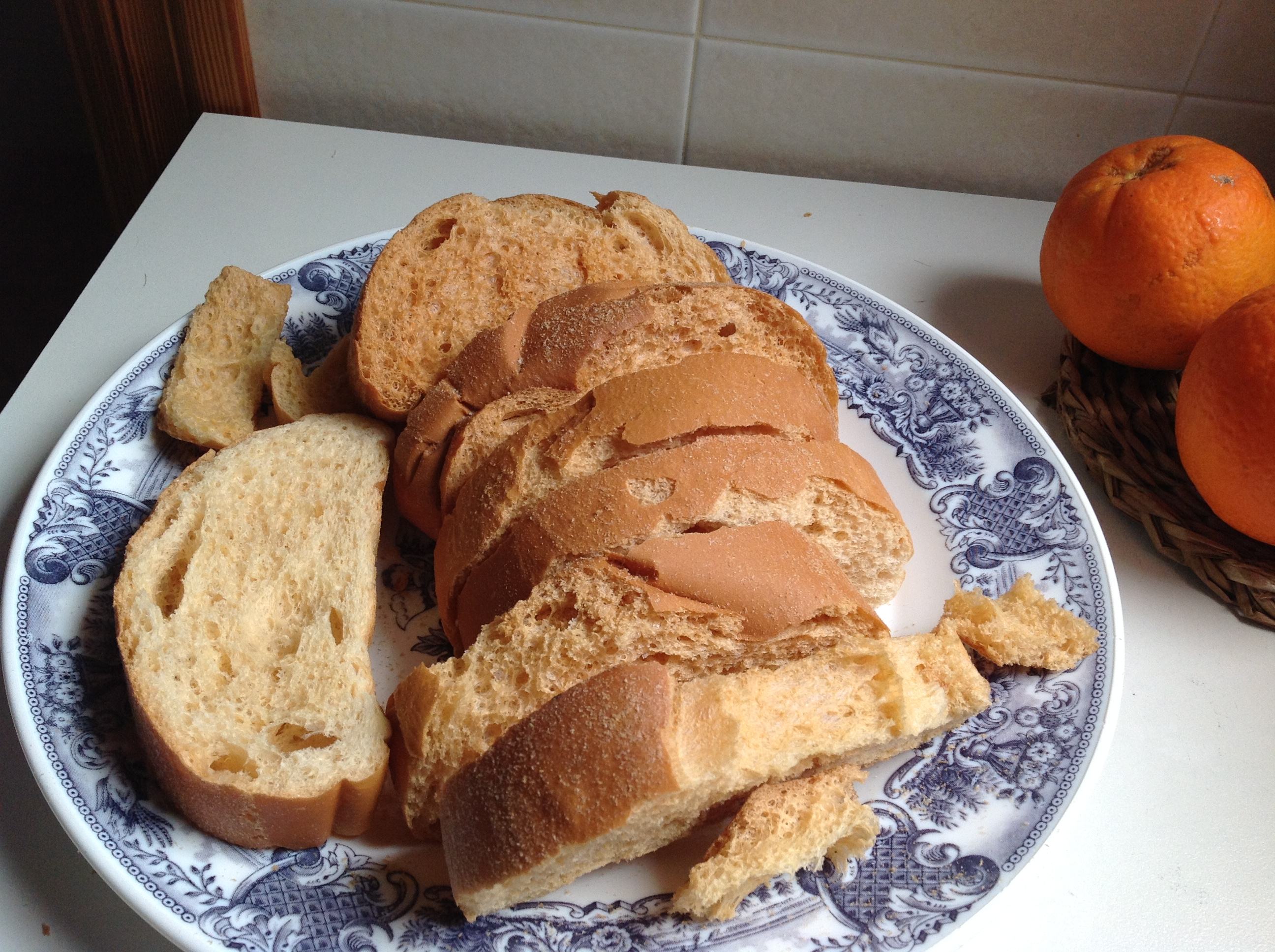 Dolses comprades al Forn Can Canet, Mercat de l'Olivar, Palma.